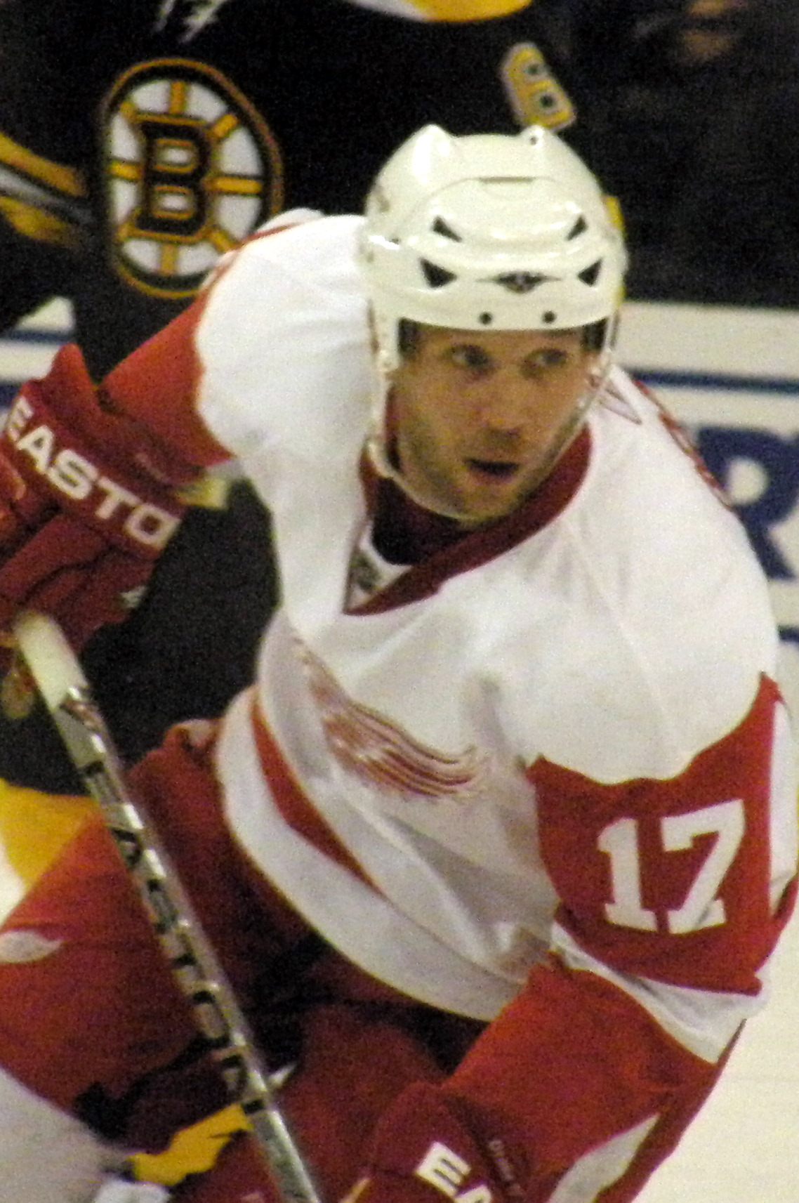 #17 Dallas Drake (RW)